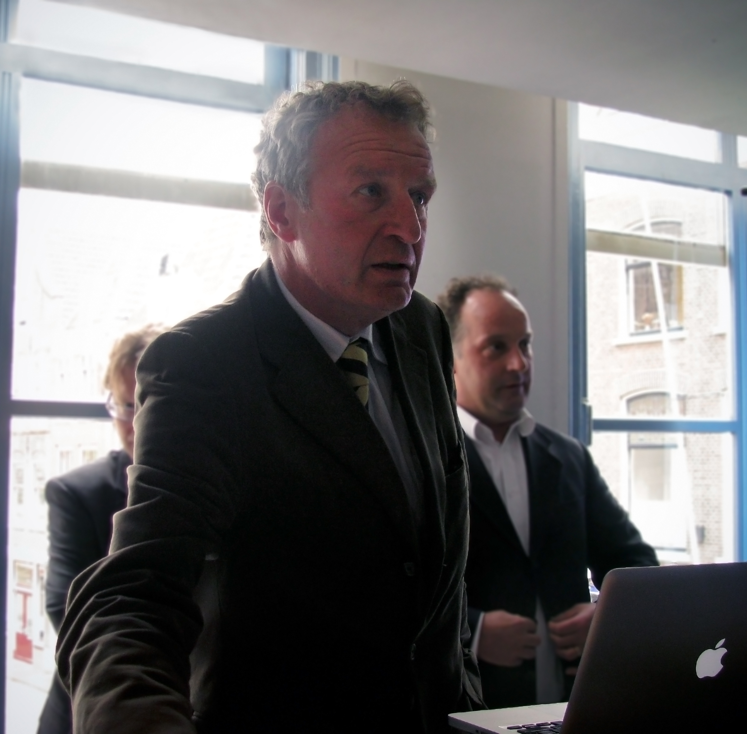 boekpresentatie De file dat ben je zelf zie a13.nu/2011/06/17/ben-je-zelf/